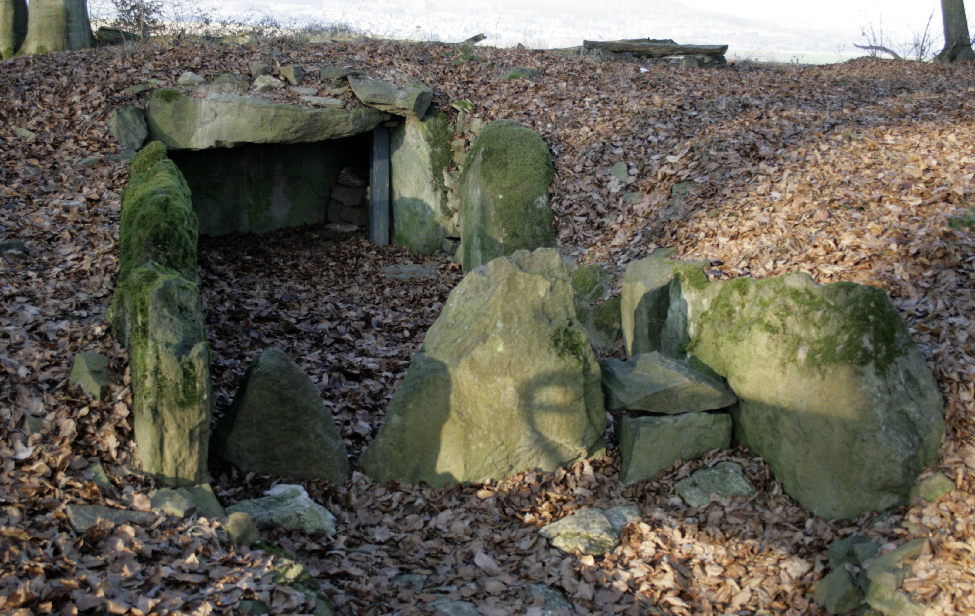 Steinkistengrab in Hadamar-Niederzeuzheim, Deutschland